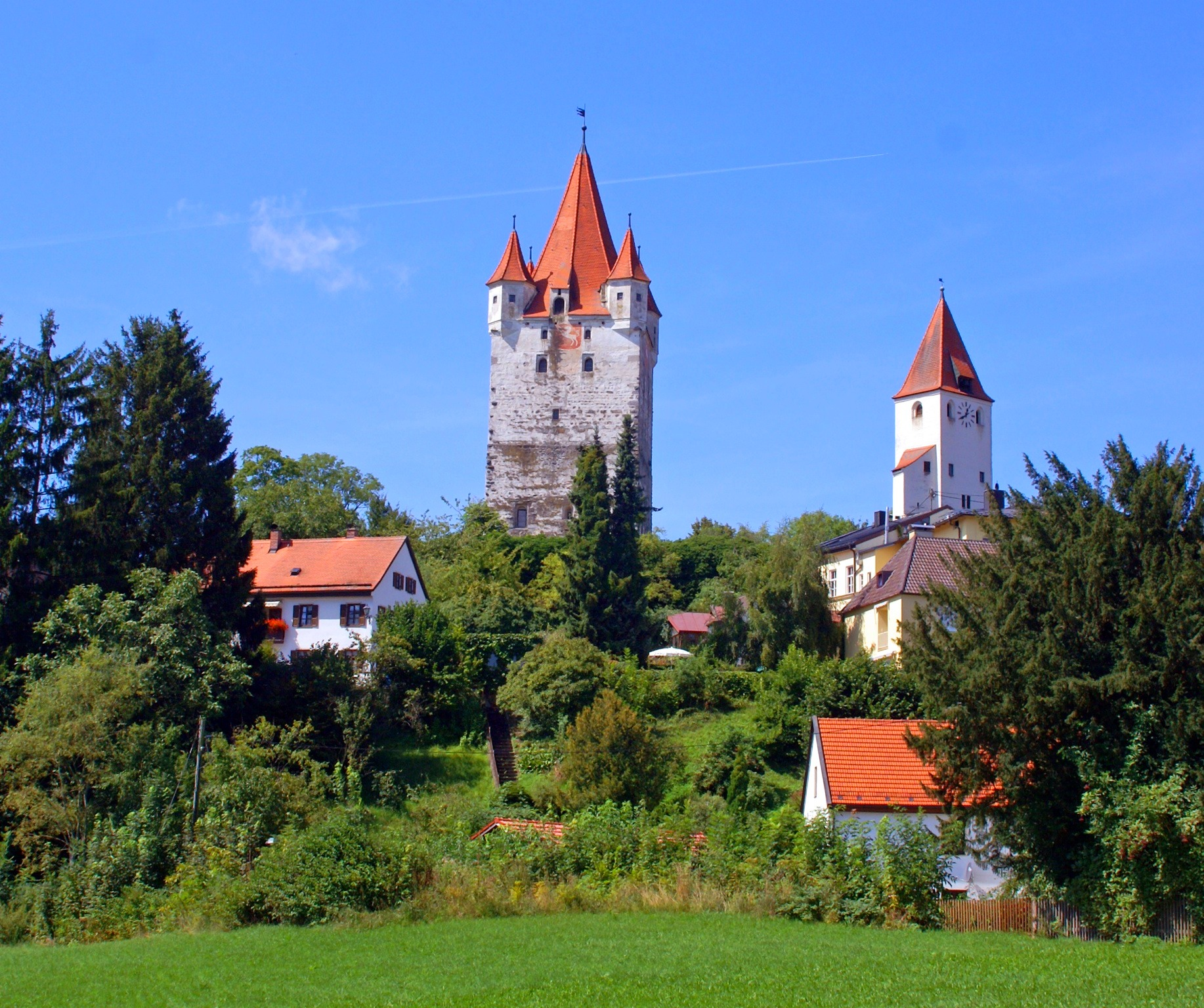 Der mehr als 40 m hohe Wohnturm in der Mark Haag in Oberbayern gehört zu den Reste einer ehemaligen Wasserburg. Hervorgegangen ist diese Wasserburg vermutlich aus einer Motte aus dem 10 Jhd. Denn eine Chronik im Kloster Ebersberg belegt, dass in der zweiten Hälfte des Jahrhunderts in der Gegend mehrere Burgen gebaut wurden. Bis 1200 lebten dort die Edelfreien de Haag, dann ging die Anlage durch Erbe an die Edelfreien Gurren von Kirchdorf über, die sich ab dem Zeitpunkt die Gurren von Haag genannt wurden. Gegen 1245 werden dann die 'Ministralien der Freiberger' Herren der Burg, die sie bis etwa 1565 hielten. Im 13 Jhd wird die Ringmauer erbaut und schon hundert Jahre später wird die Anlage als Schloss bezeichnet. Zwischen 1476 und 1481 wird die Burg dann unter Graf Sigmund vollständig ausgebaut. Der heute noch weithin sichtbare Wohnturm (Donjon) endstand unter den Edelfreien Gurren von Haag anfänglich als vier stöckiges Bauwerk. Er wurde noch einmal im 15. Jhd erhöht und mit einem Kanonenstock versehen. Die obersten Stockwerke verfügen über einen Kamin und Ecktürmchen. Ab etwa 1800 verfiel die Anlage allmählich und wurde schließlich zum Abbruch freigegeben. Heute sind nur noch sehr wenige Teile der riesigen Anlage übrig geblieben: Der Donjon, Teile des oberen Zwinger und der Ringmauer, sowie Teile des unteren Schlosses. Johannes Heribert Pohl.